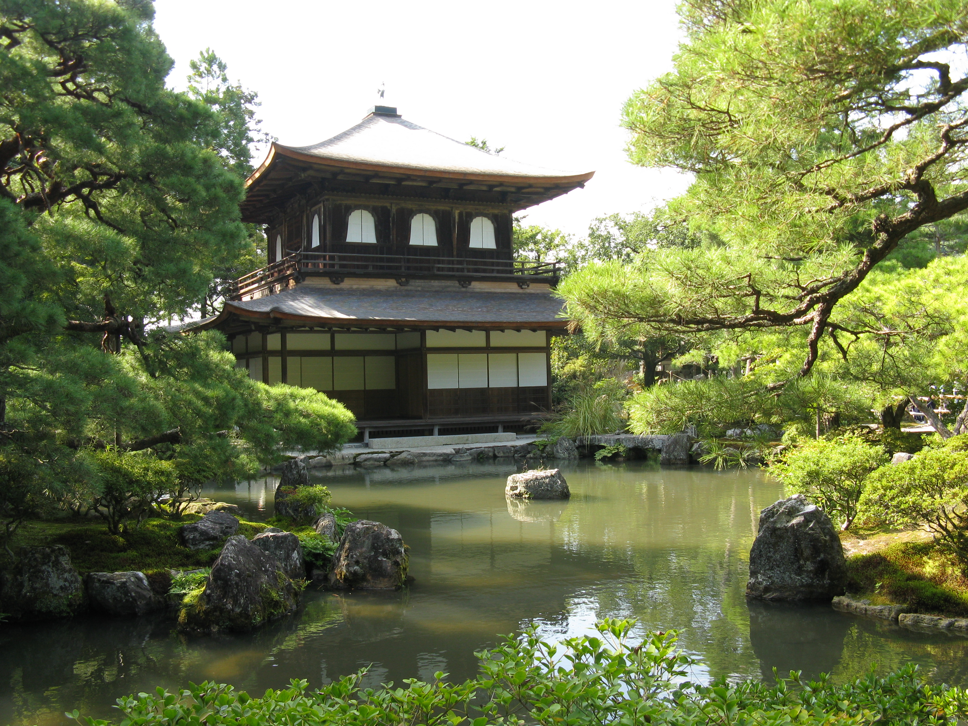 慈照寺 観音殿